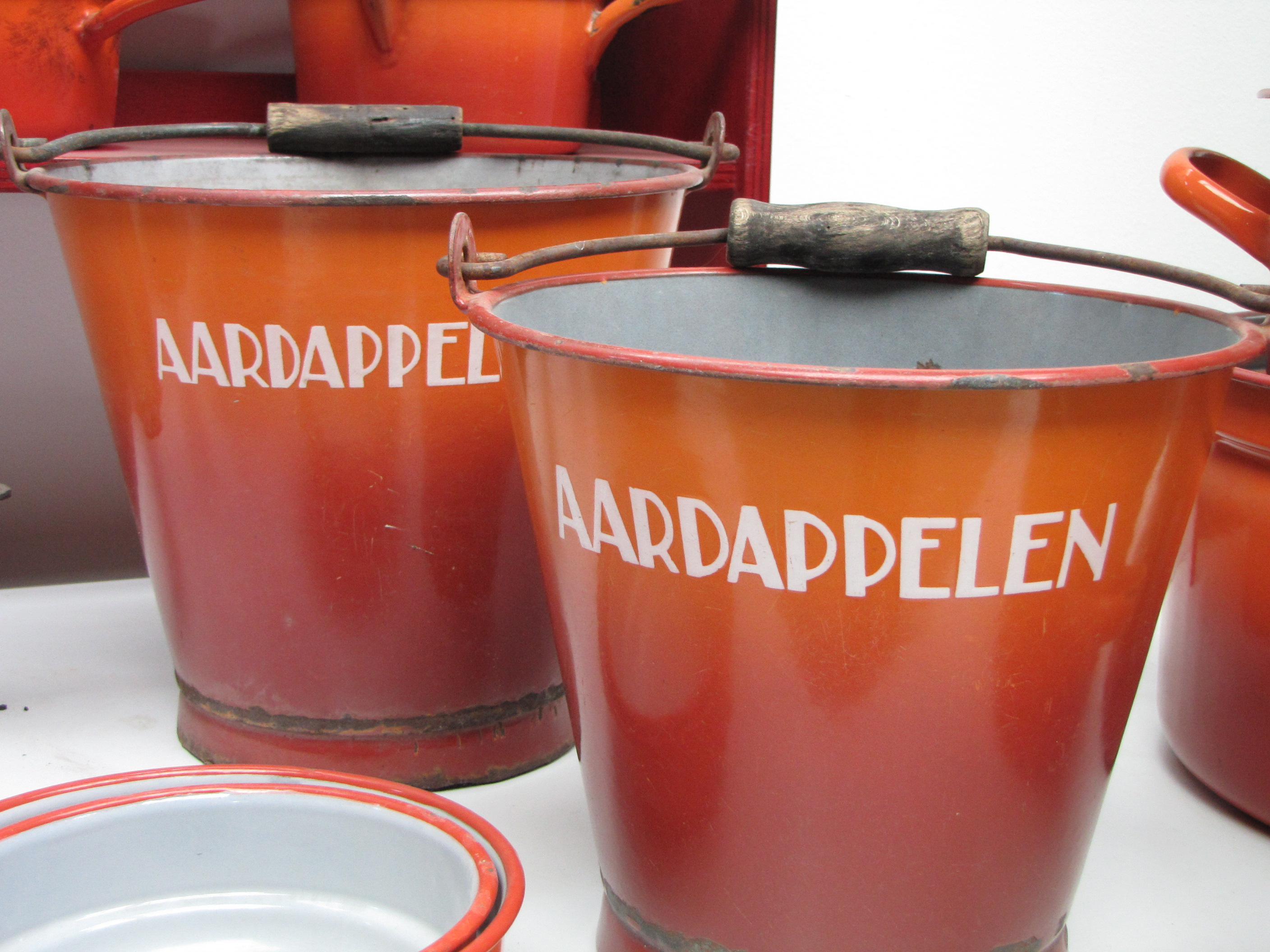 Email-emmers "Aardappelen".